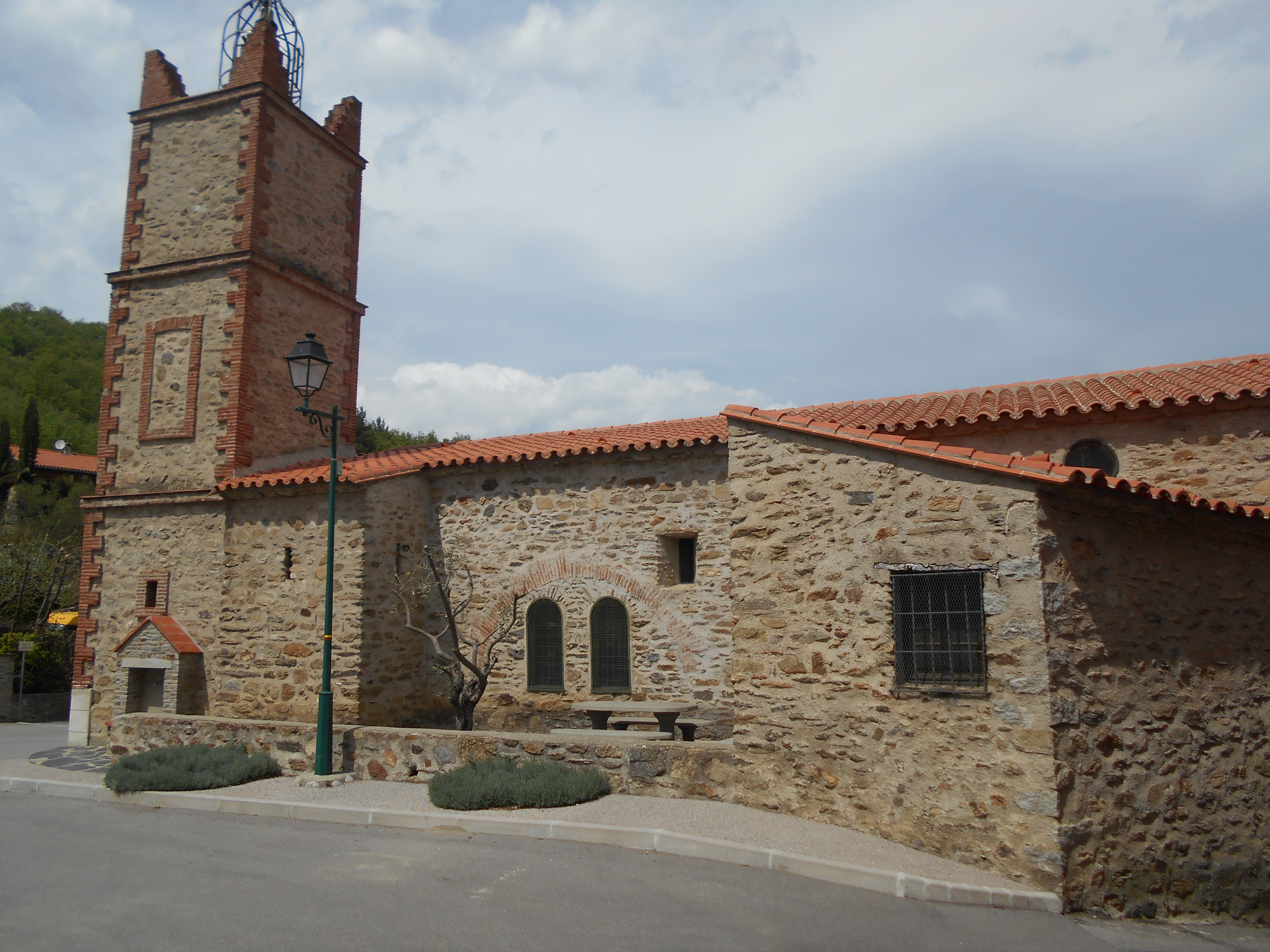 Sant Marrtí de Clarà (Clarà i Villerac)